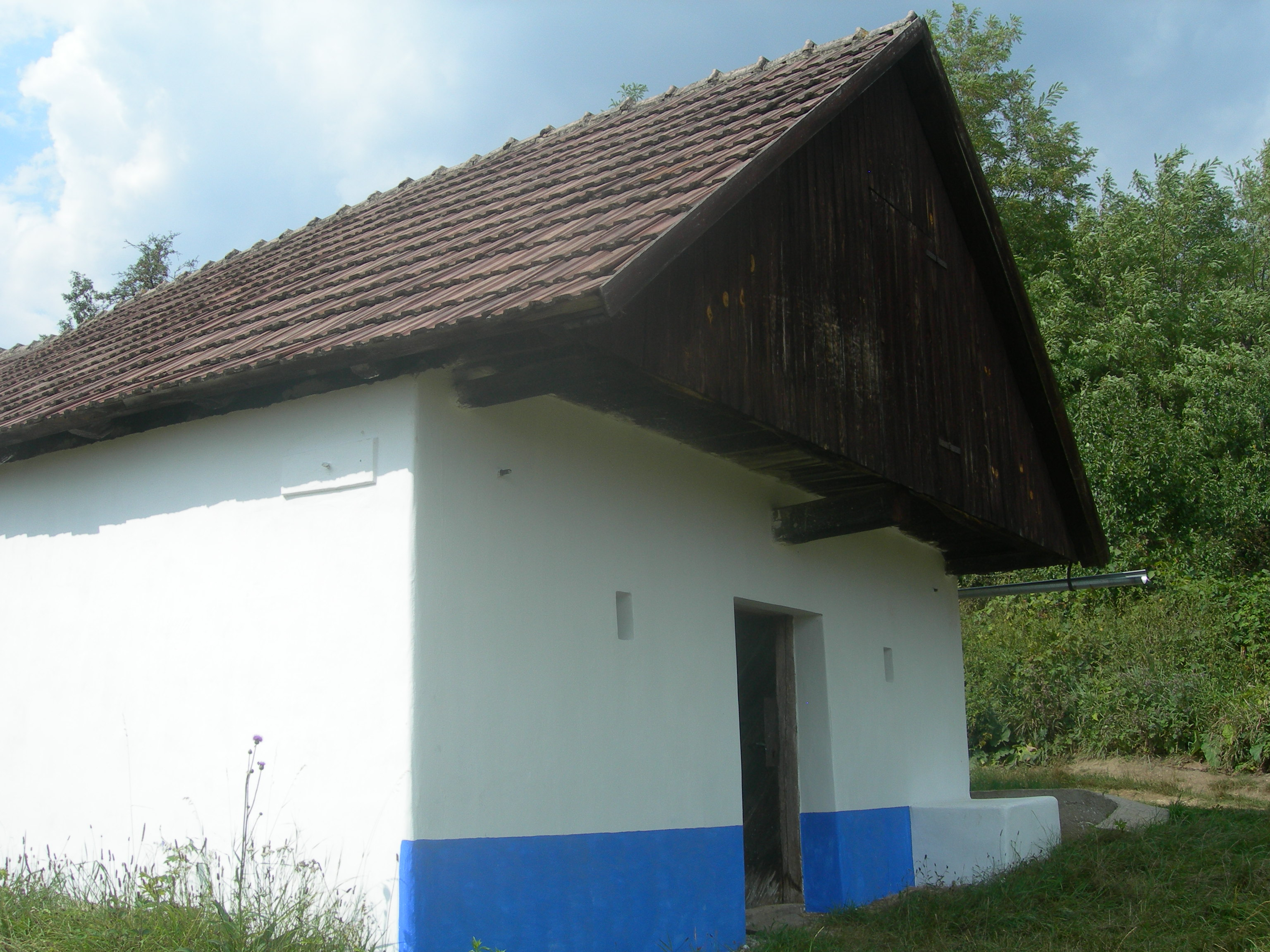 drobná vinařská architektura v Havřice (Uherský Brod)